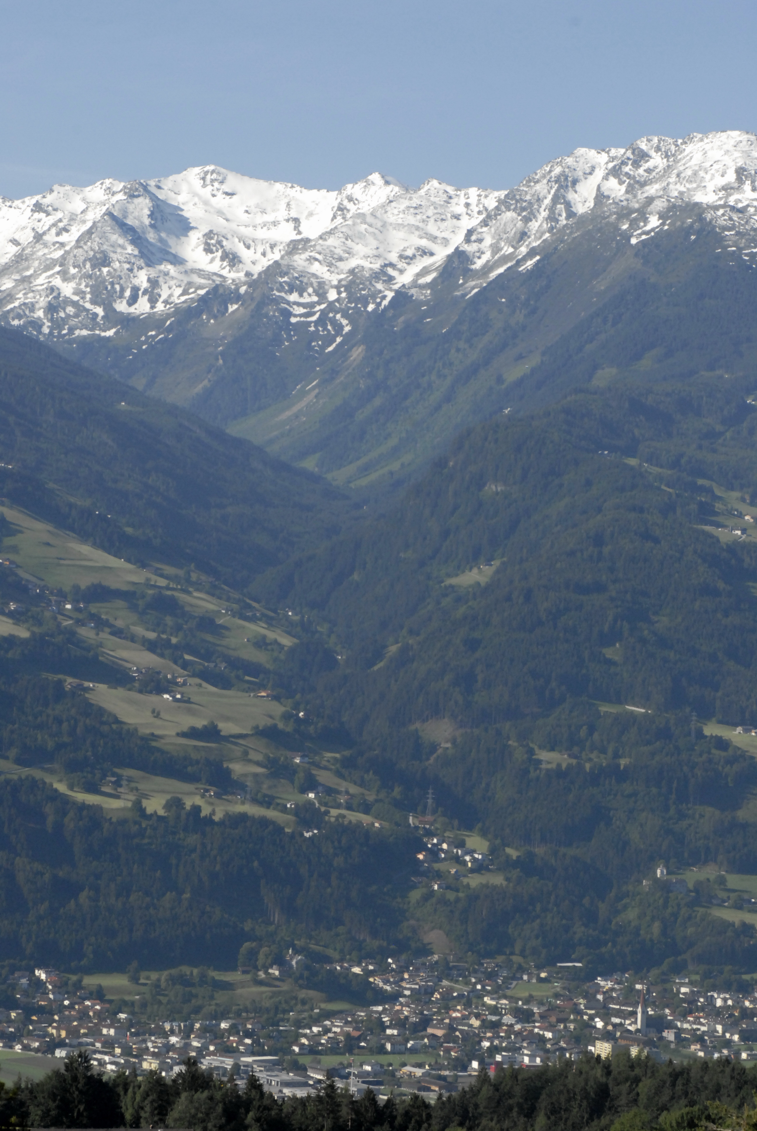 Blick von Gnadenwald über Volders und durch das Voldertal zum Rosenjoch